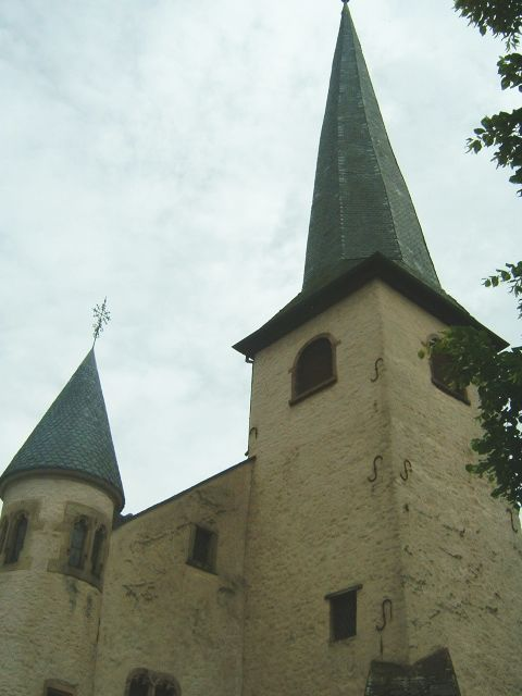 St. Laurentius in Diekirch in Luxemburg (erbaut 15. Jahrhundert)